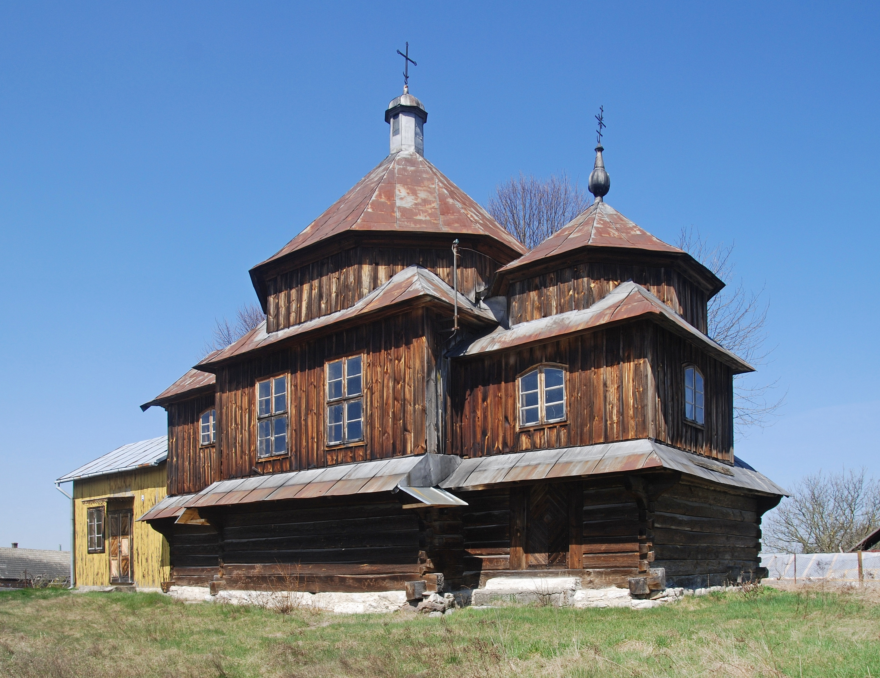 wieś Chotylub, cerkiew Opieki Najświętszej Maryi Panny Wikidata has entry Q11689688 with data related to this item.